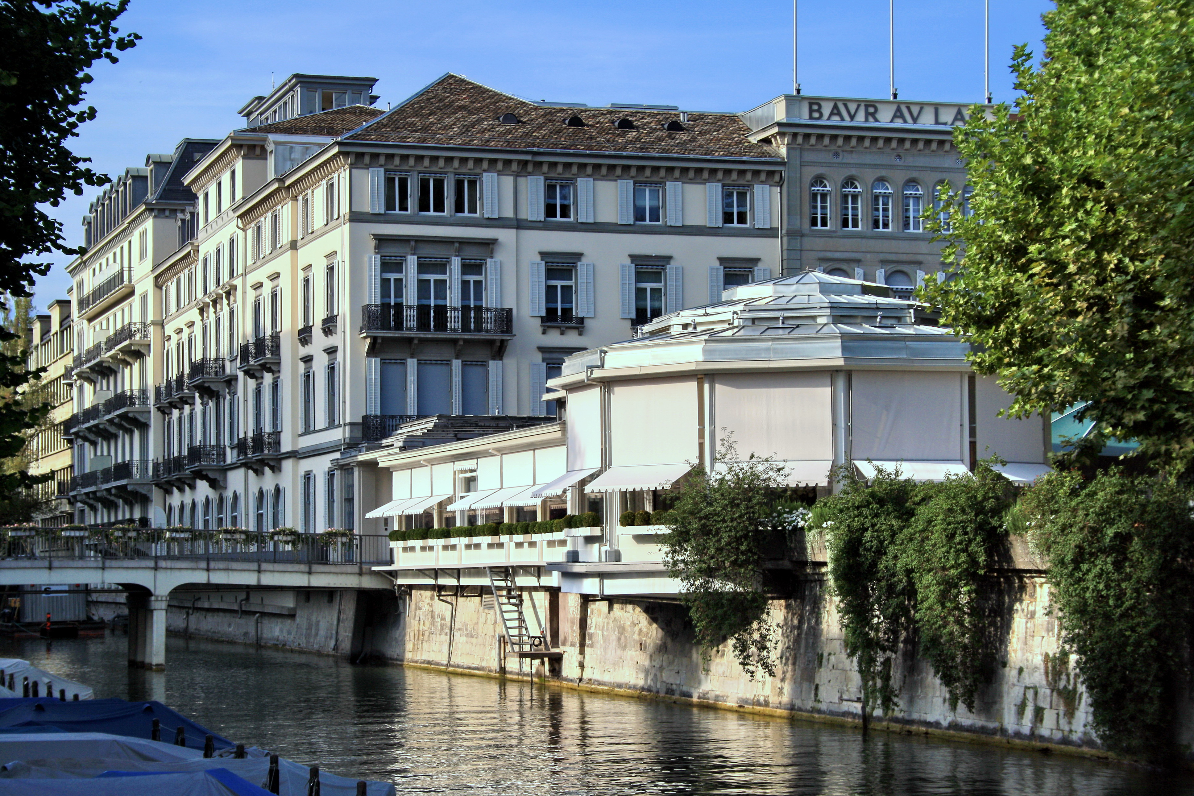 Schanzengraben in Zürich (Switzerland), as seen from General-Guisan-Quai, Hotel Baur au Lac to the right.